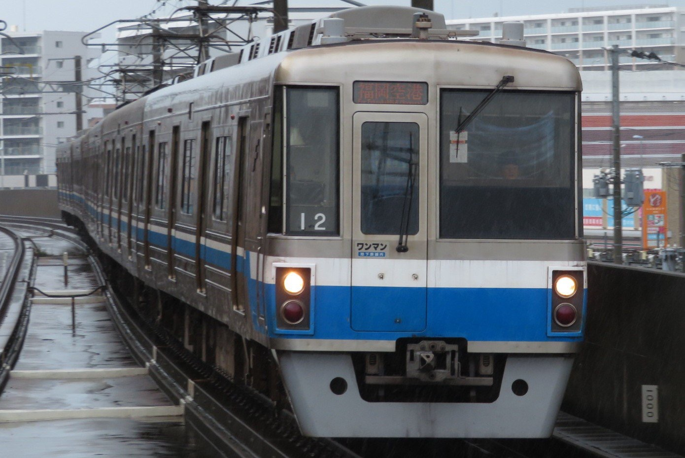 福岡市営地下鉄1000系第12編成 普通福岡空港